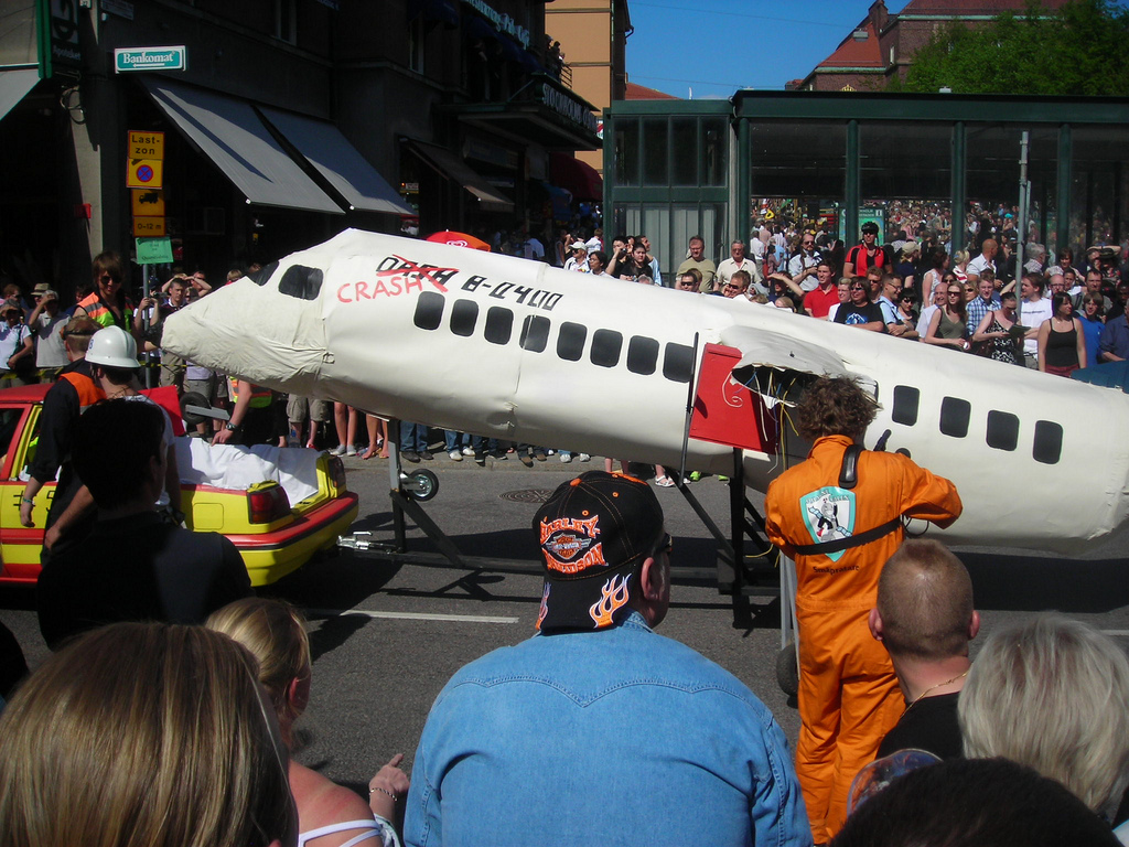 På Quarnevalen 2008.